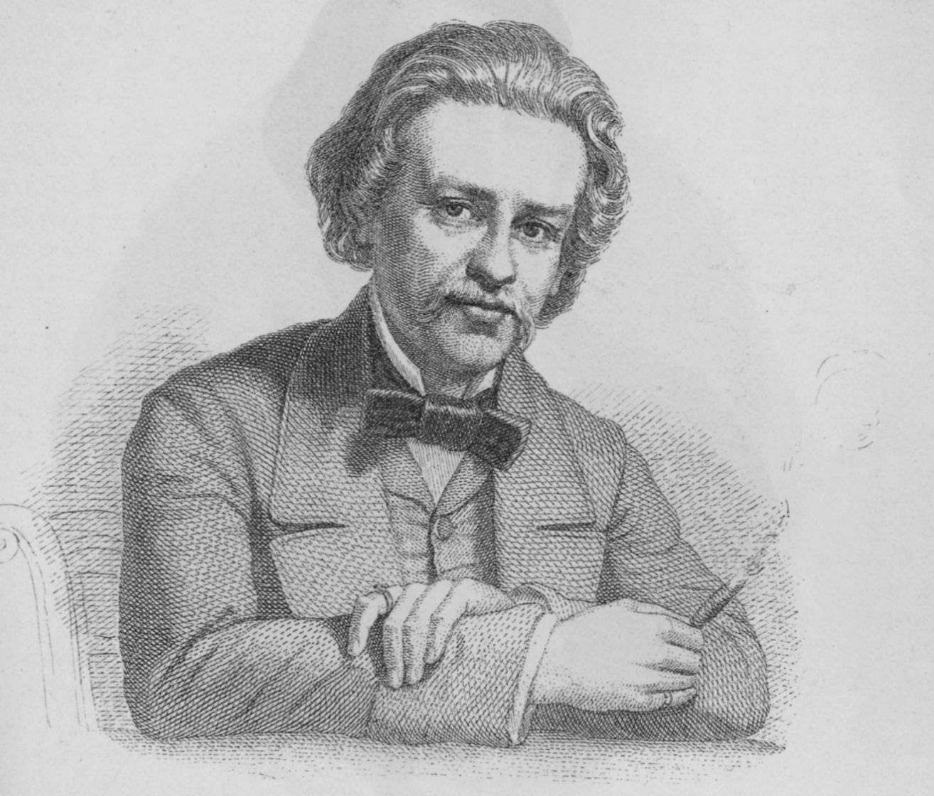 Albert Emil Brachvogel († 1878), nach einem Stich von A. Weger